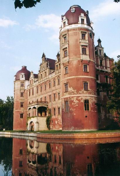 Das Neue Schloss in Bad Muskau im Juni 2003